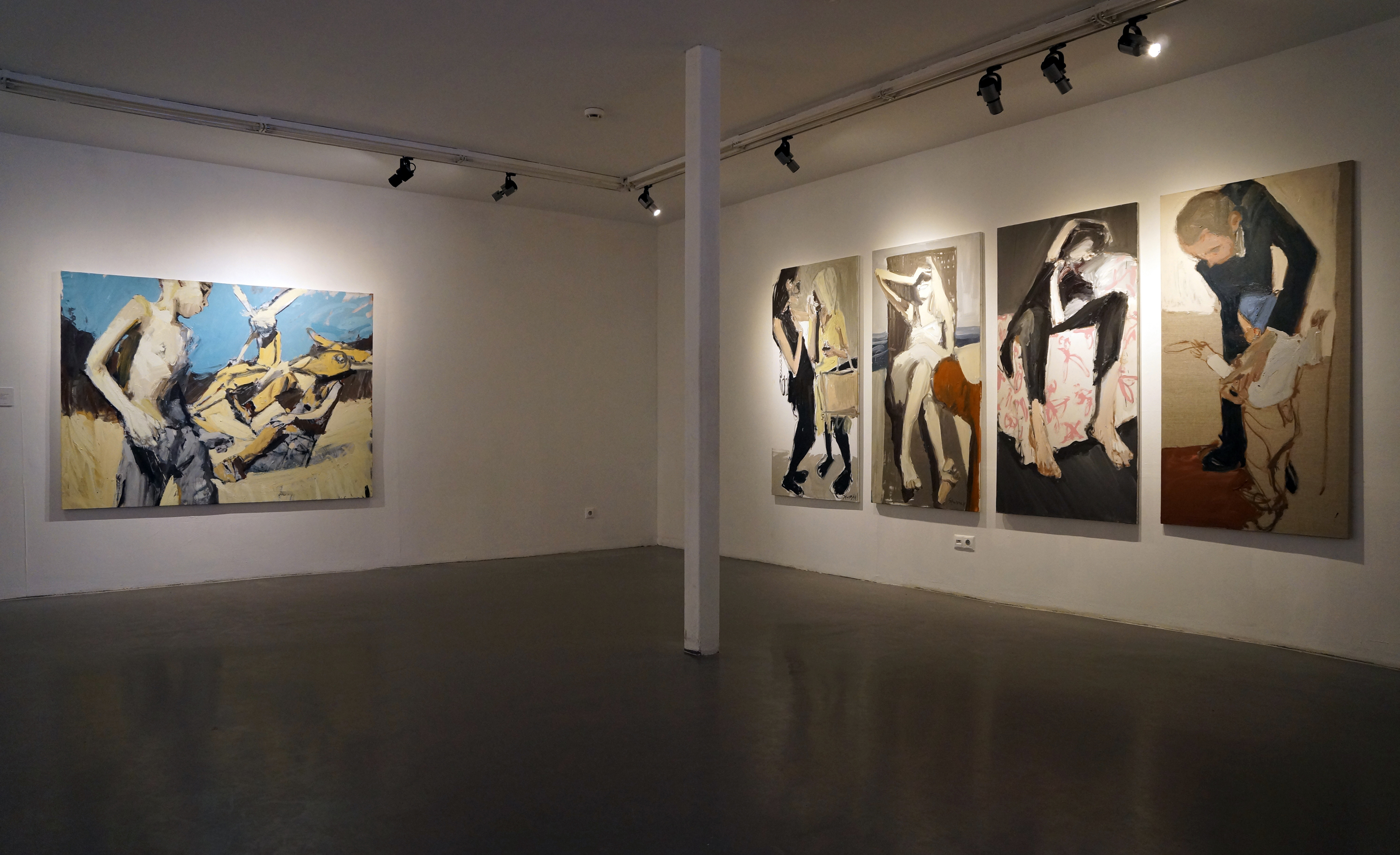 Работы Владимира Семенского на выставке